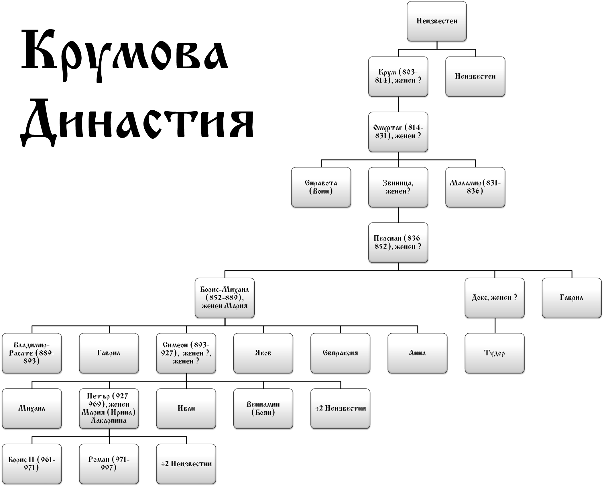 Изработено от Потребител:Scroch на основата на изображения от "История на Средновековна България VІІ-ХІV век Том І" на издателство Анубис.